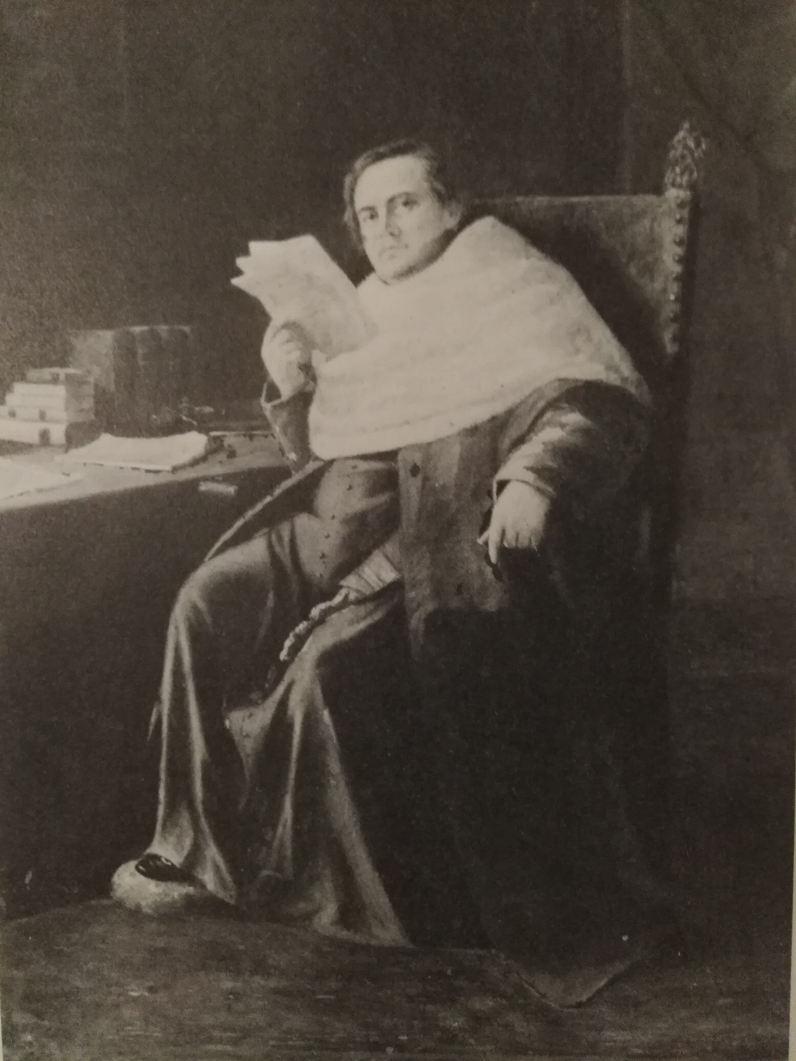 Joseph Guthlin siégeant